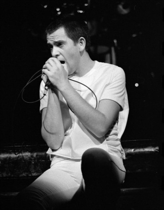 Peter Gabriel, Chateau Neuf, Oslo, Norway